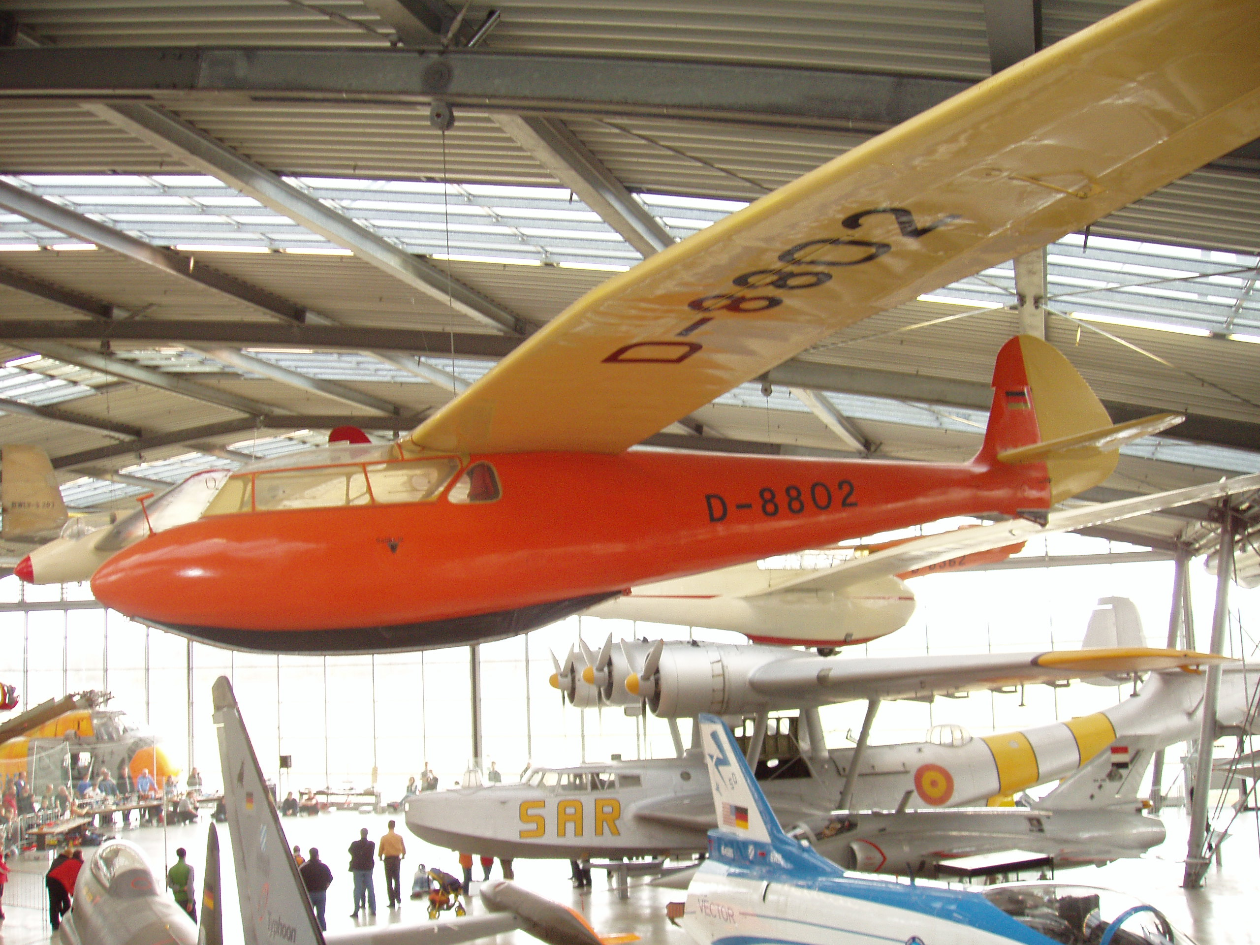 Condor IV in the Flugwerft Schleißheim. Author: Fabian von Blücher